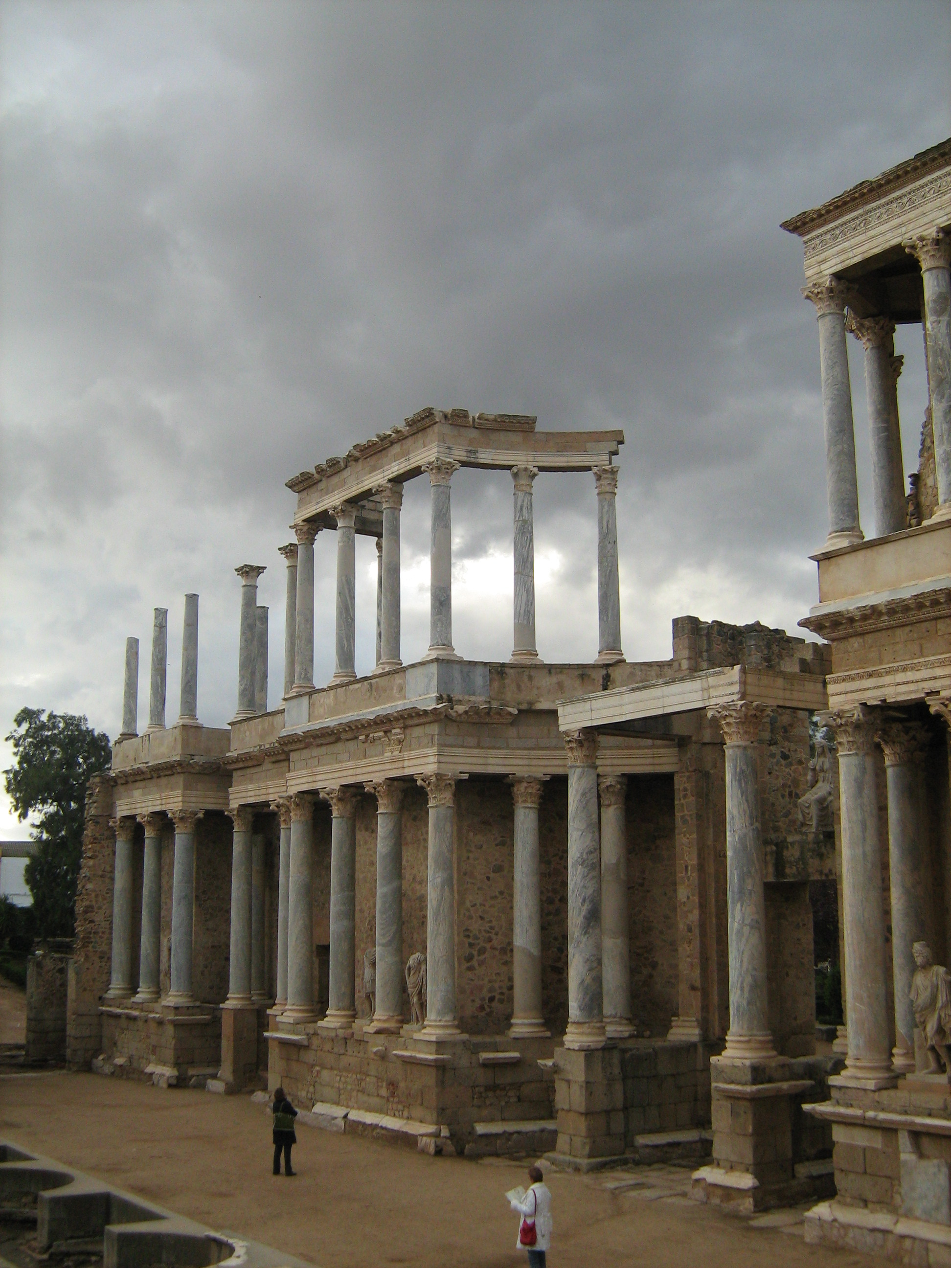 Teatro de Mérida com um céu cinzento de fundo.